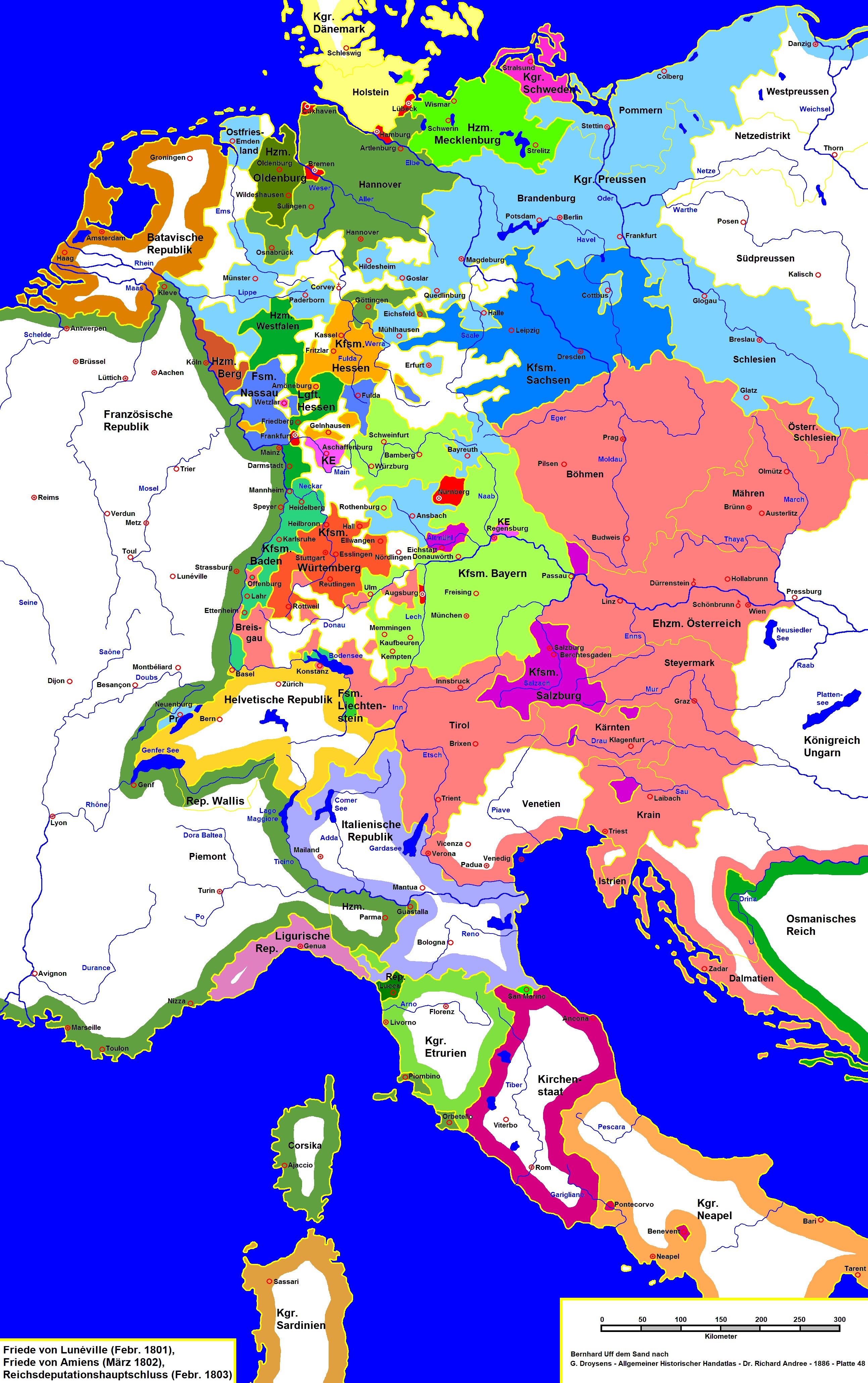 Mitteleuropa um 1803